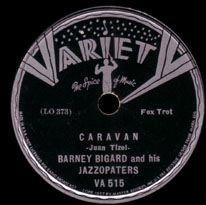 Caravan; hanglemez